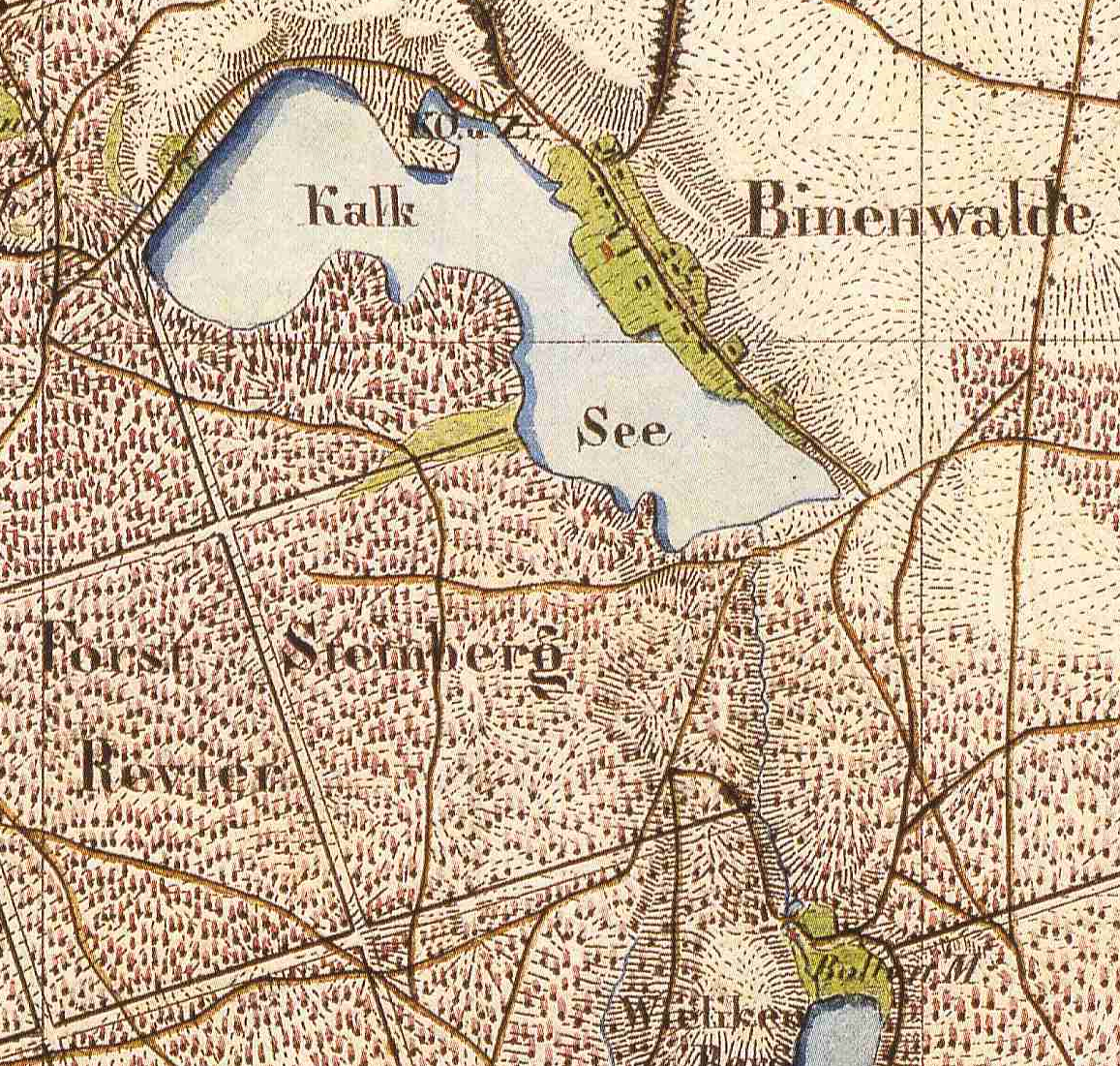 Binenwalde und Boltenmühle, Neuruppin, Lkr. Ostprignitz-Ruppin, Brandenburg, Ausschnitt aus dem Urmesstischblatt 2942 von 1825